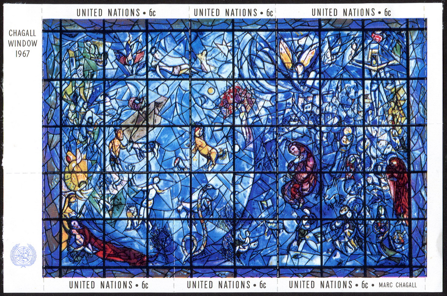 Беларуская (тарашкевіца): Расьпісанае Маркам Шагалам вітражнае шкло ў нью-ёрскай штаб-кватэры ААН